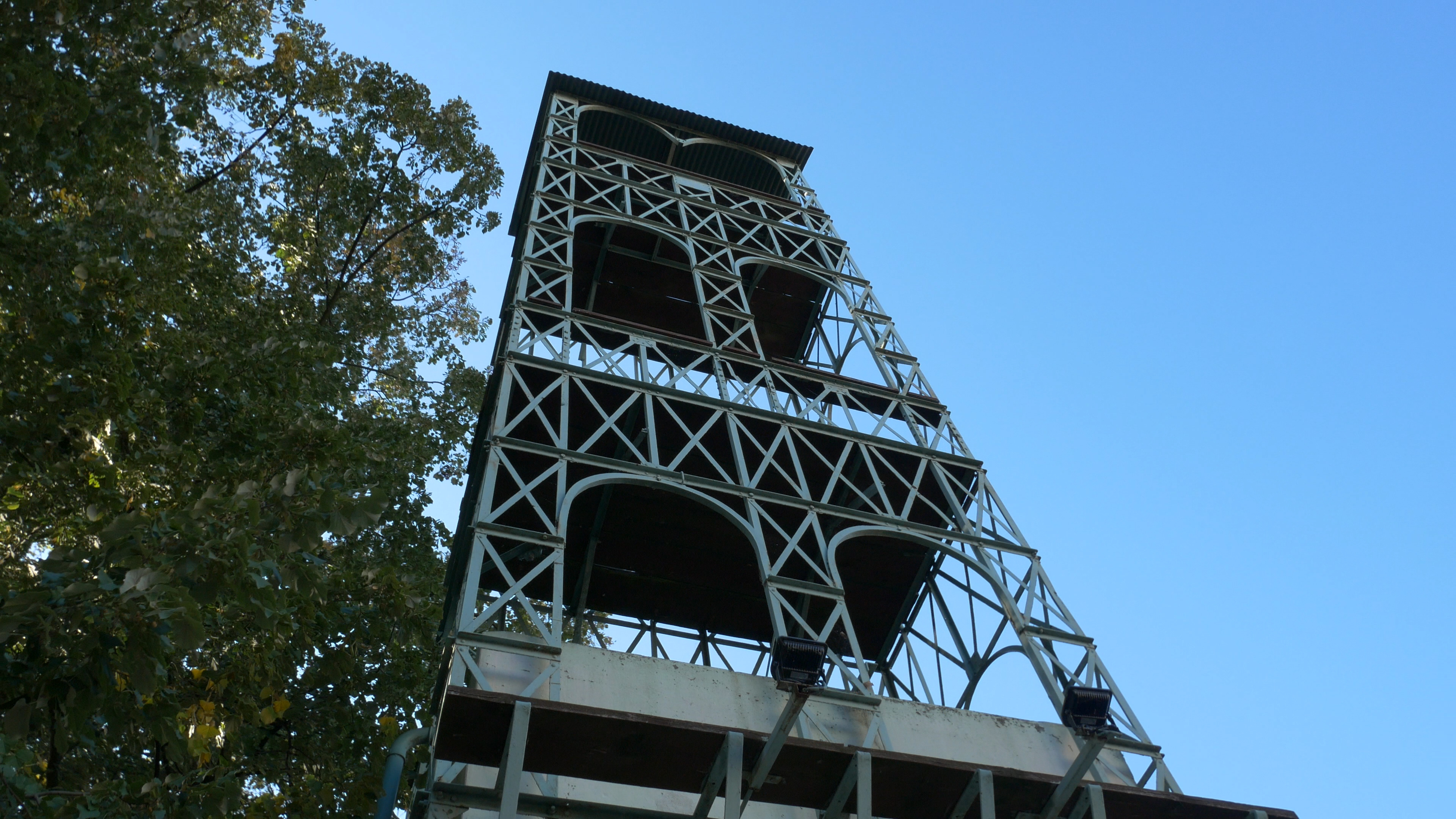 Vatrogasni penjački toranj u Slavonskom Brodu